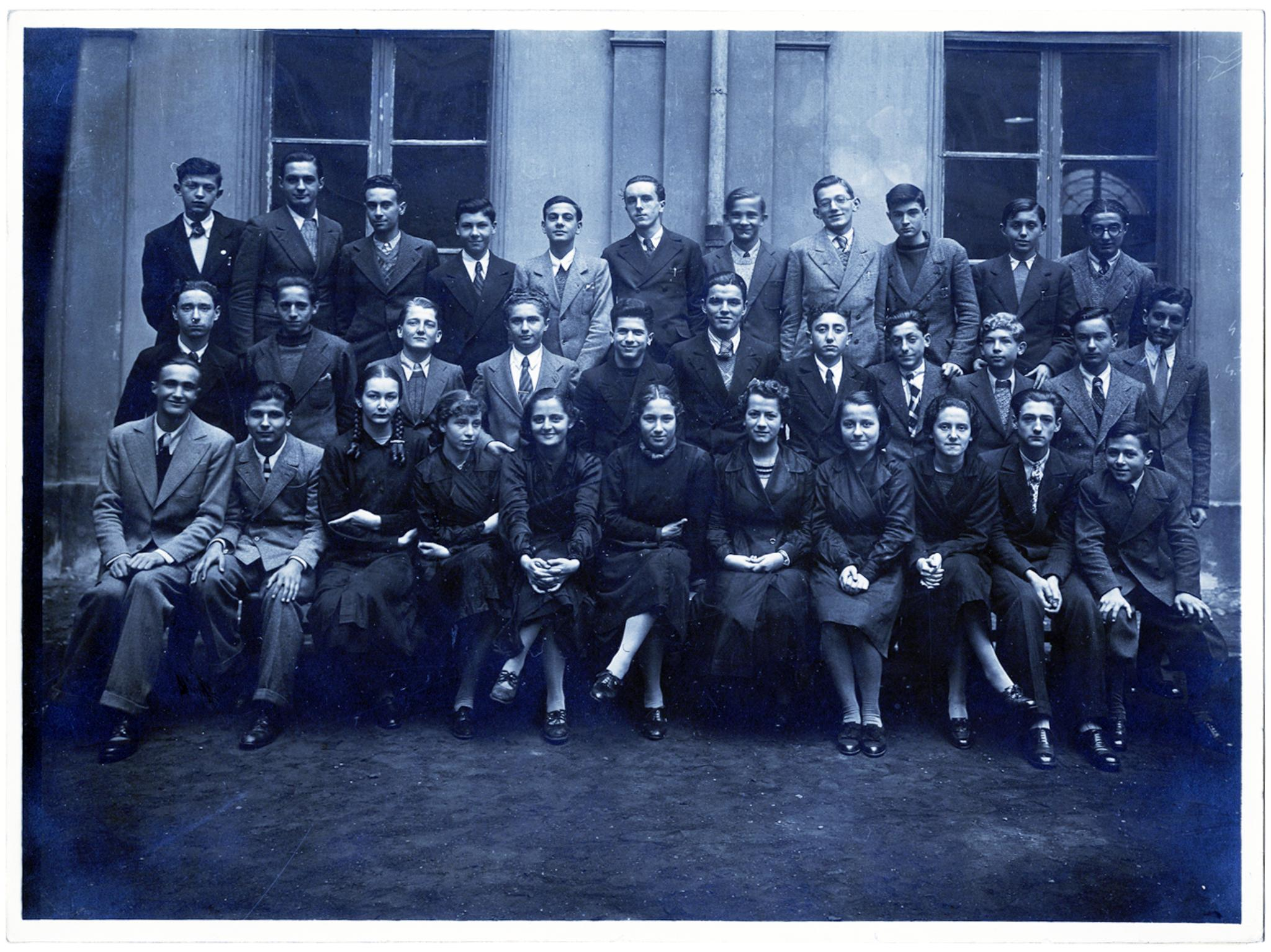 Liceo classico Massimo d'Azeglio - classe V ginnasio C - anno scolastico 1936-37